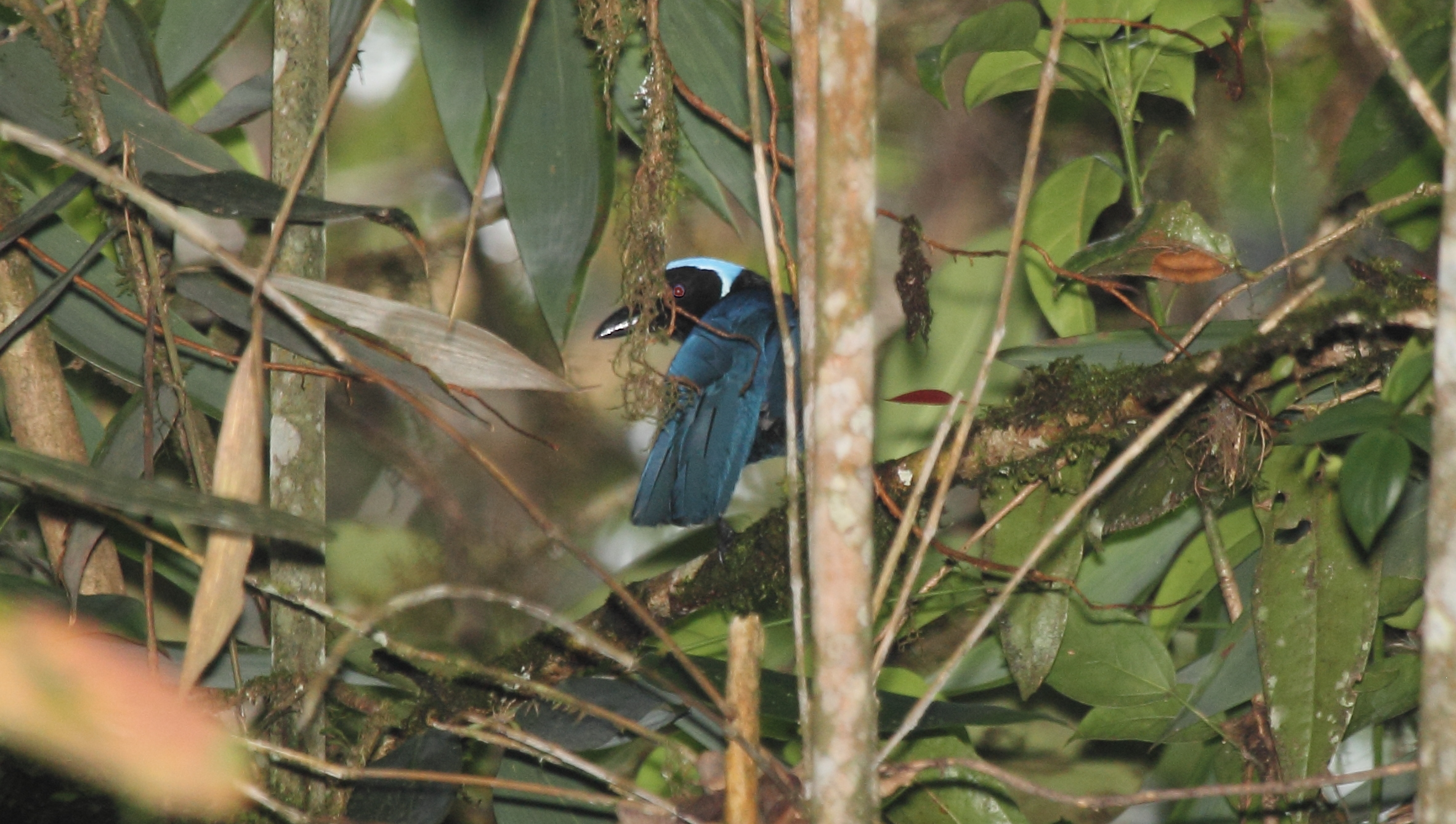 Blaukappenhäher (Cyanolyca cucullata) in Purulhá, Guatemala.